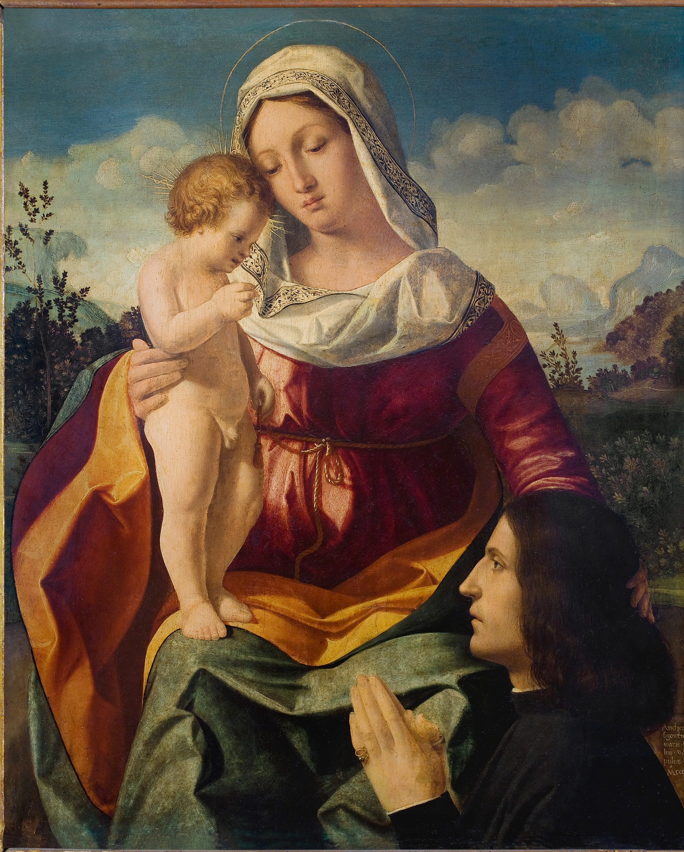 Andrea Previtali: Madonna col bambino e un devoto 1504 olio su tavola, cm 63 x 54 Padova, Musei Civici